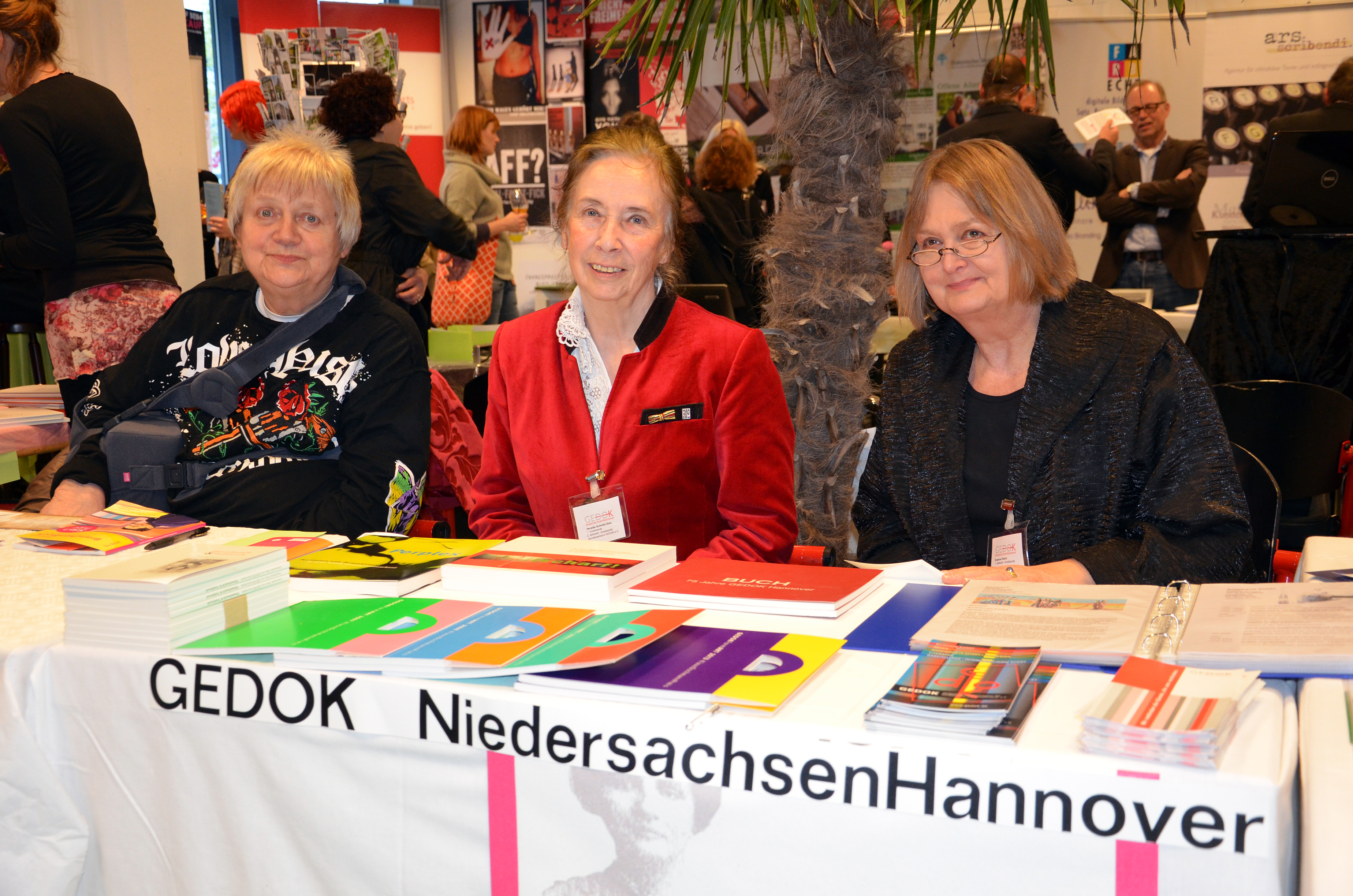 Auf der Ausstellung zur Mitgliederversammlung des Freundeskreises Hannover 2014 im frisch sanierten Kulturzentrum Pavillon präsentierte sich auch die Gemeinschaft der Künstlerinnen und Kunstförderer GEDOK NiedersachsenHannover, unter anderem mit der Ersten Vorsitzenden Heralde Schmitt-Ulms (Mitte), der Ersten Stellvertreterin Susanne Reich (rechts) und als Gast die Künstlerin Dietlind Preiss (links) ...